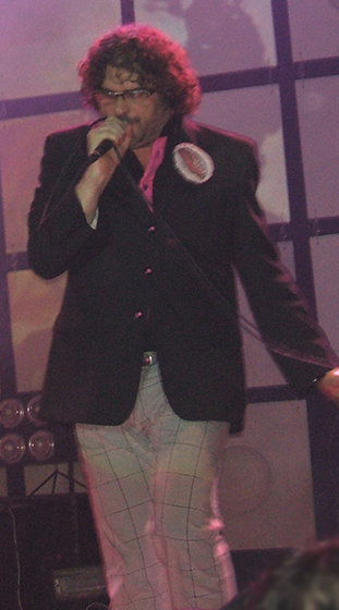 Santiago Tavella, cantente del Cuarteto de Nos